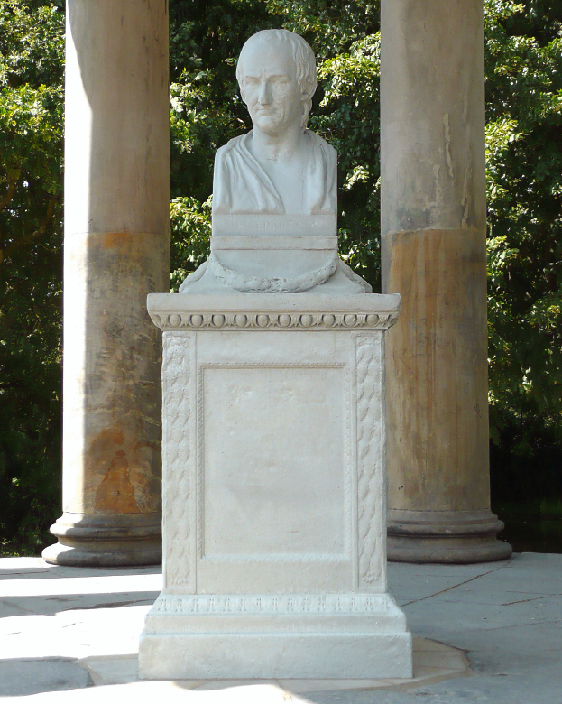 Kopie der Leibnizbüste (im Leibniztempel Hannover) des irischen Bildhauers Christopher Hewetson